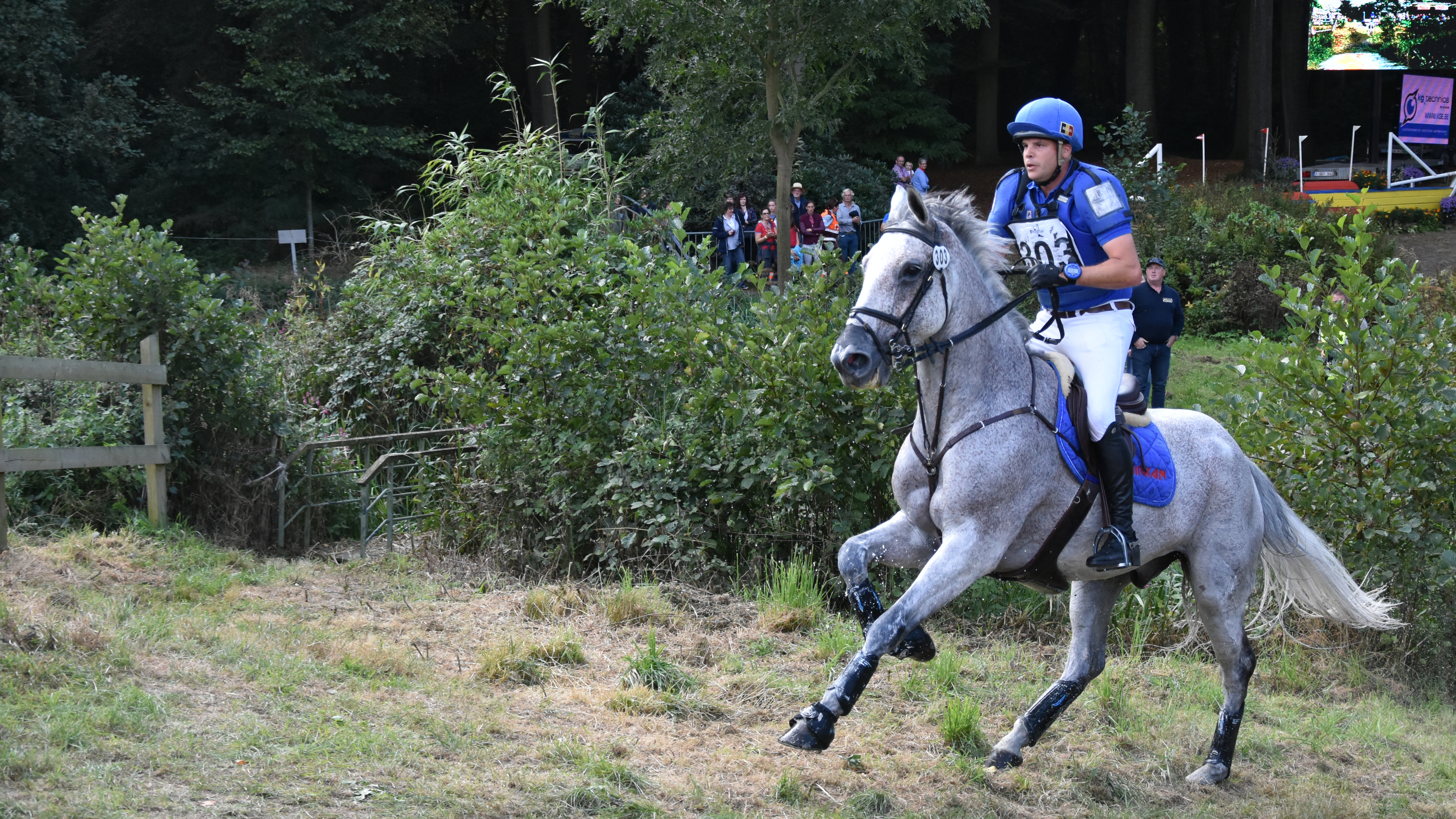 Steve Van Winkel op de Military Waregem, België